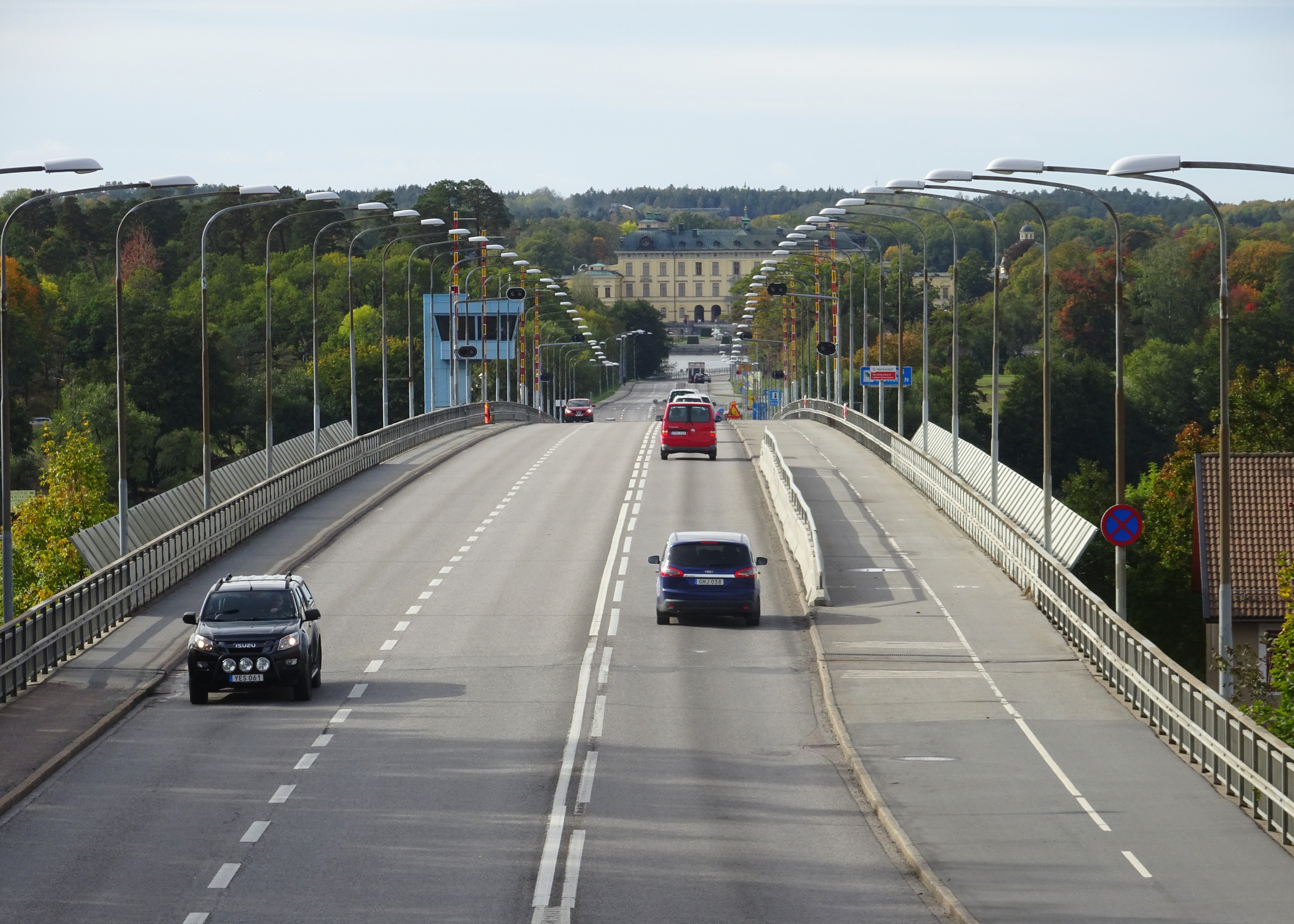 Nockebybron, vy mot Drottningholm